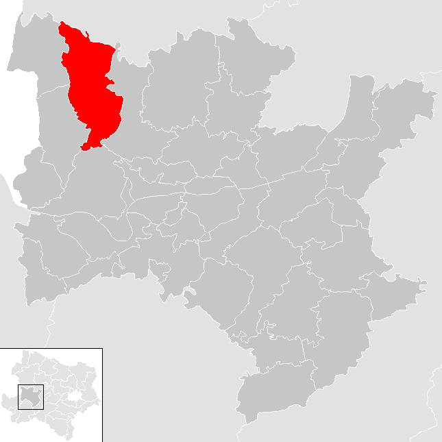 Bezirk Melk